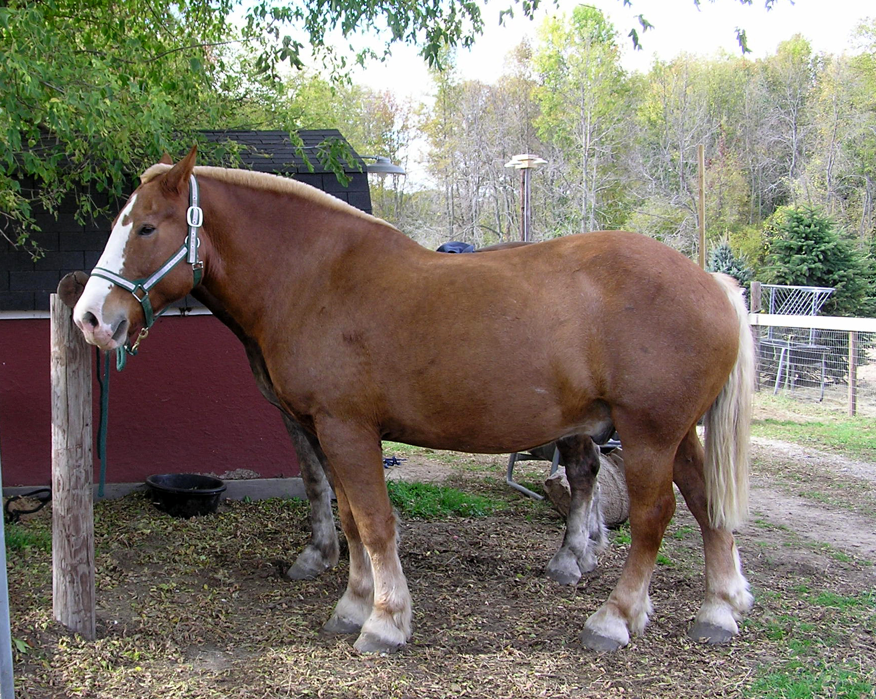 big boys (Belgian draft horse)